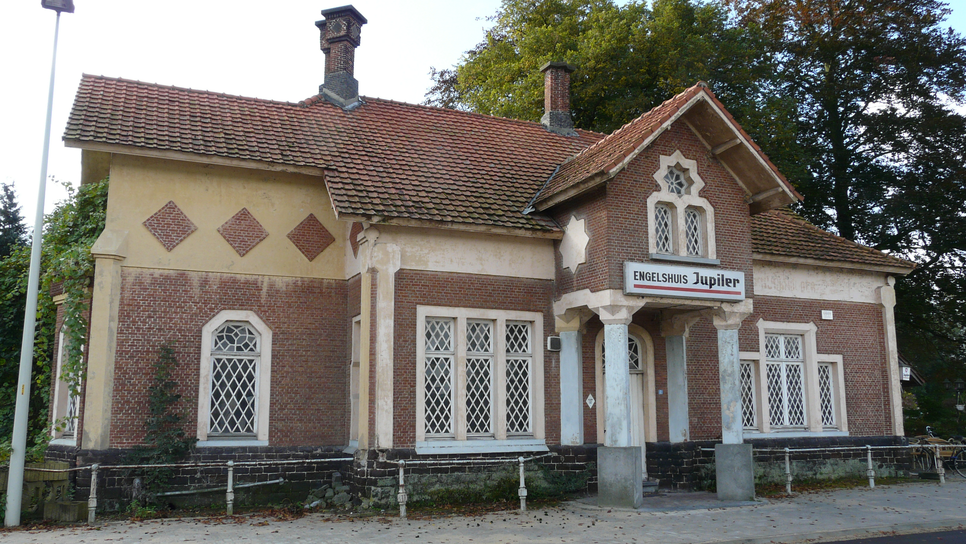 Herber Engels Huis uit circa 1855, Herenthoutsesteenweg 2, Bourwel